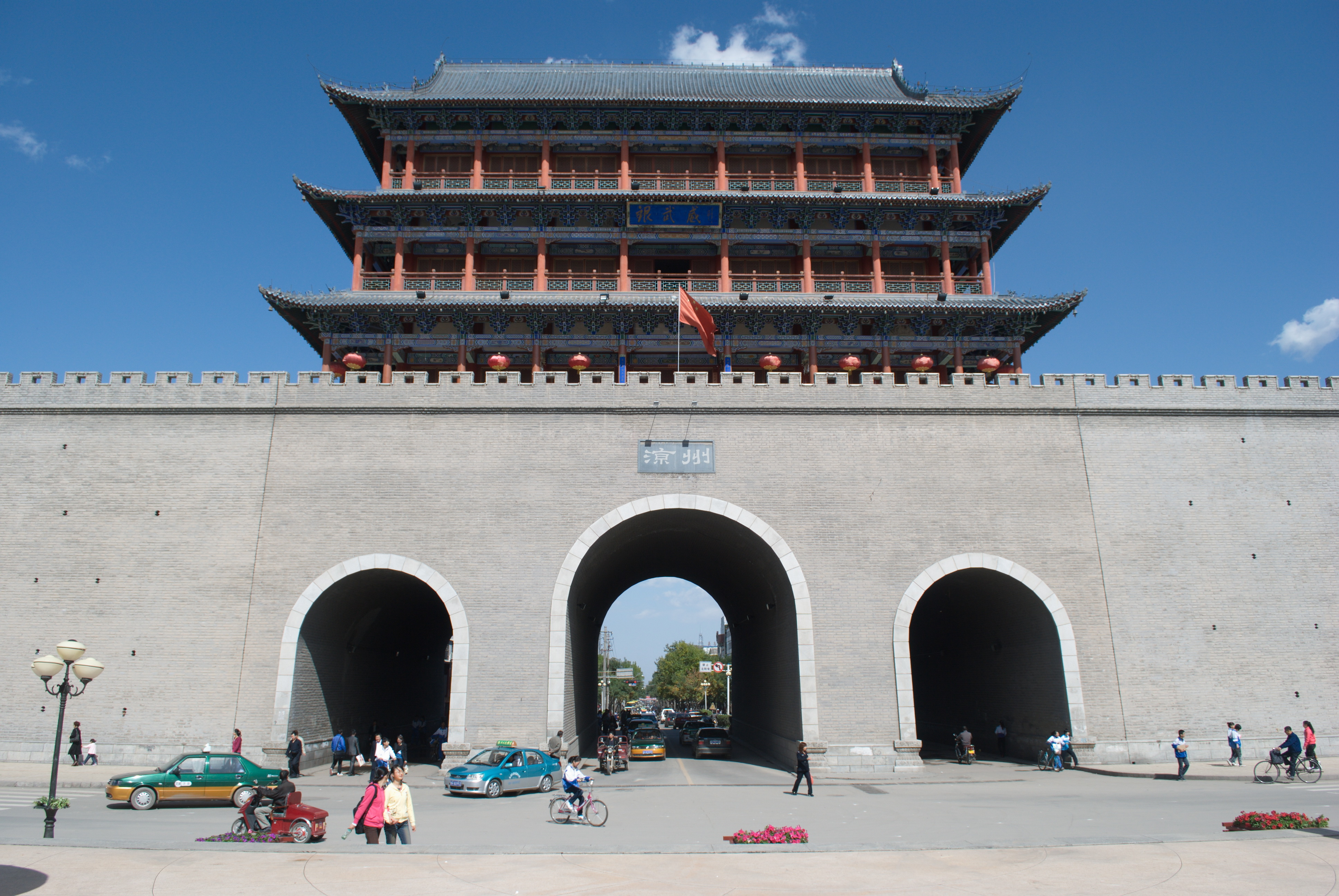 甘肃省武威市凉州区